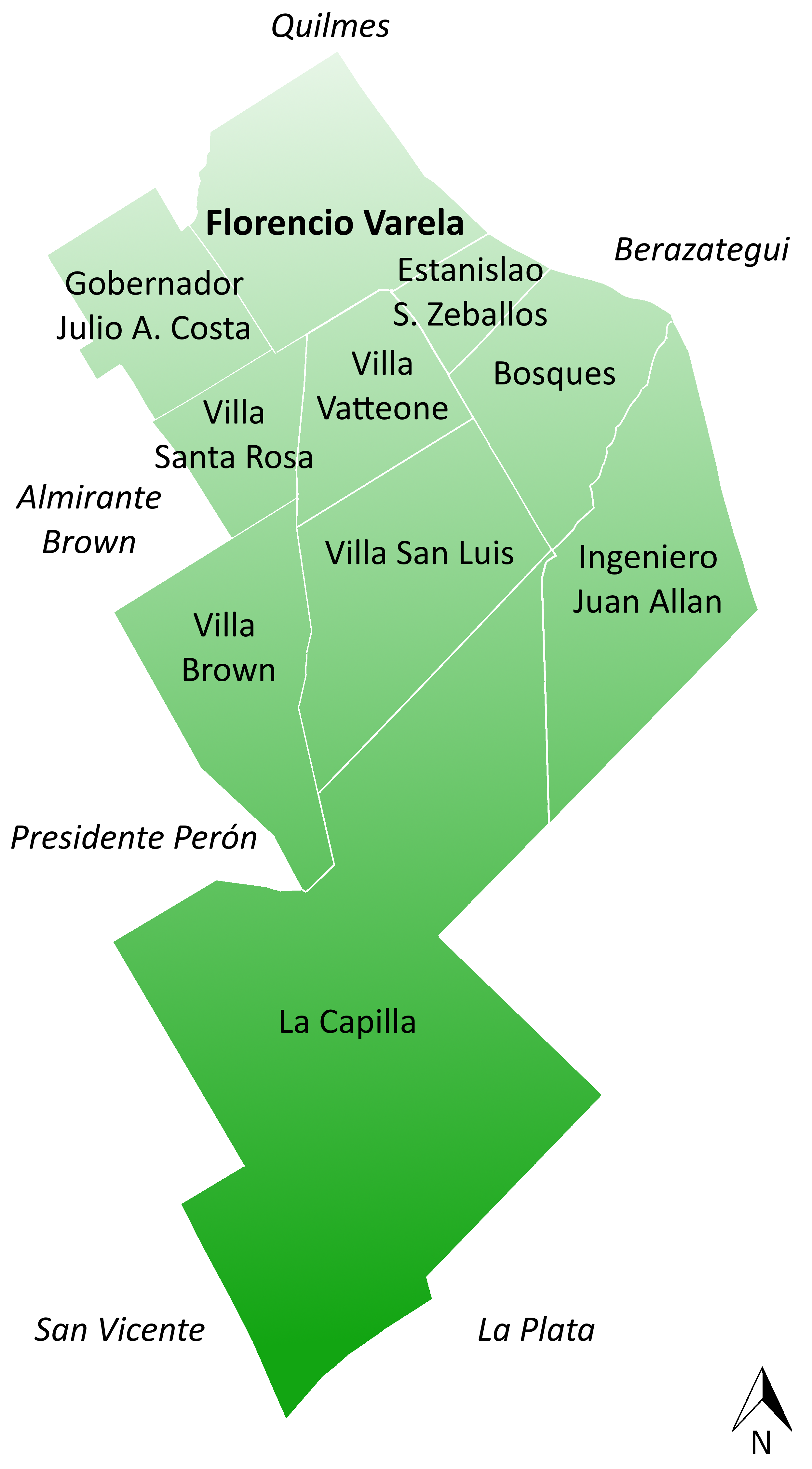 Mapa localidades Fcio Varela